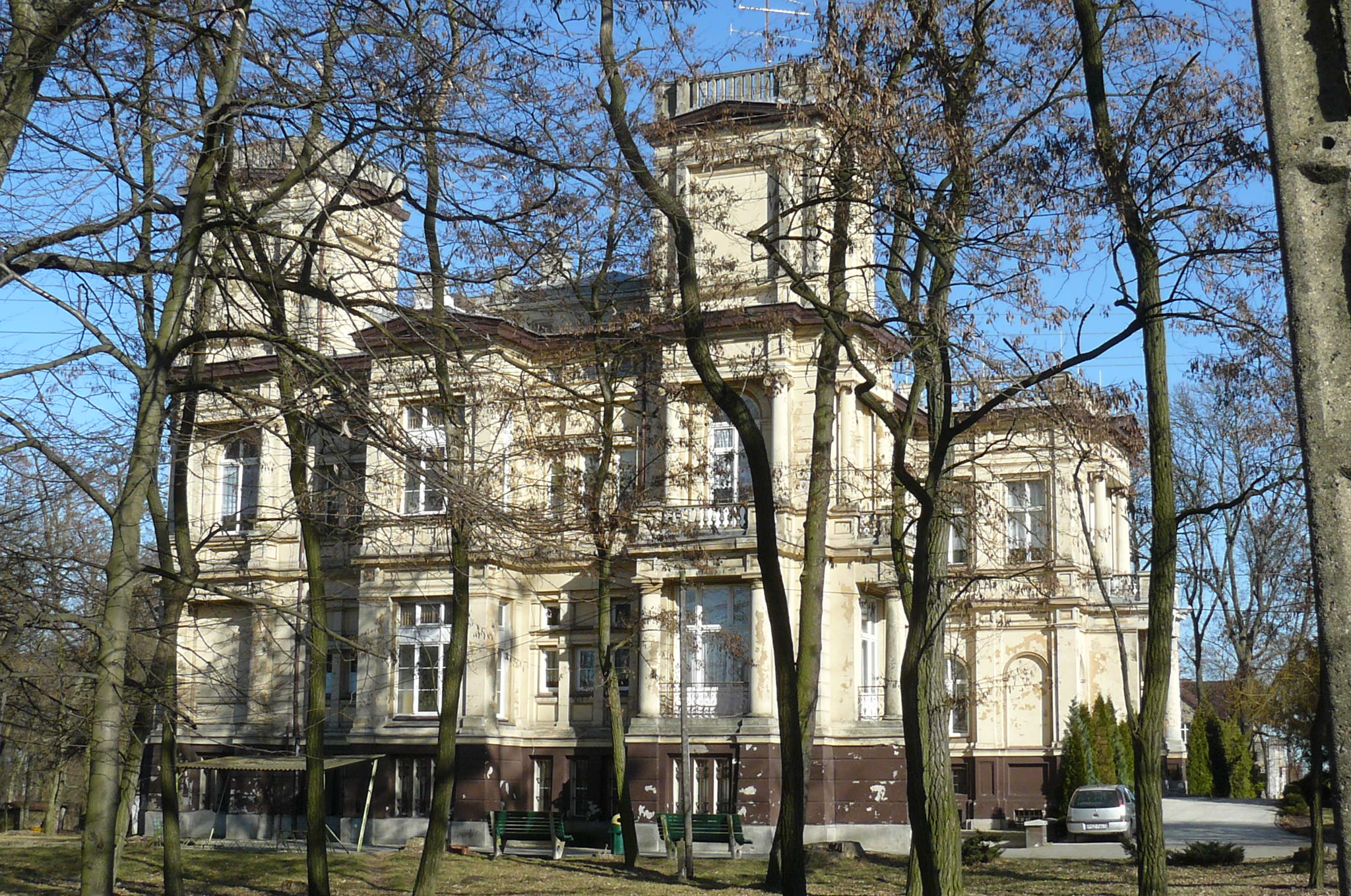 Nowa Wieś - pałac, 1874